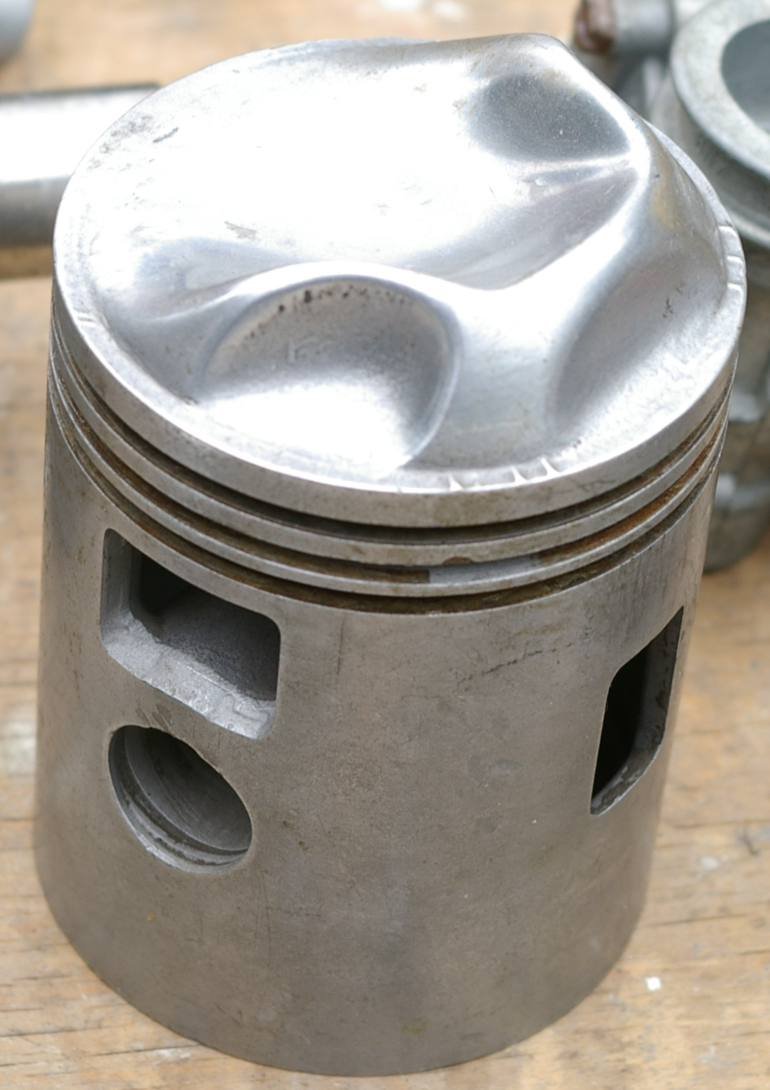 Nasenkolben eines Zweitakter-Motorradmotors